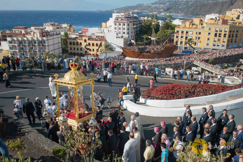 Fotografía de la entrada en la ciudad de La Virgen de Las nieves en su paseo lustral.